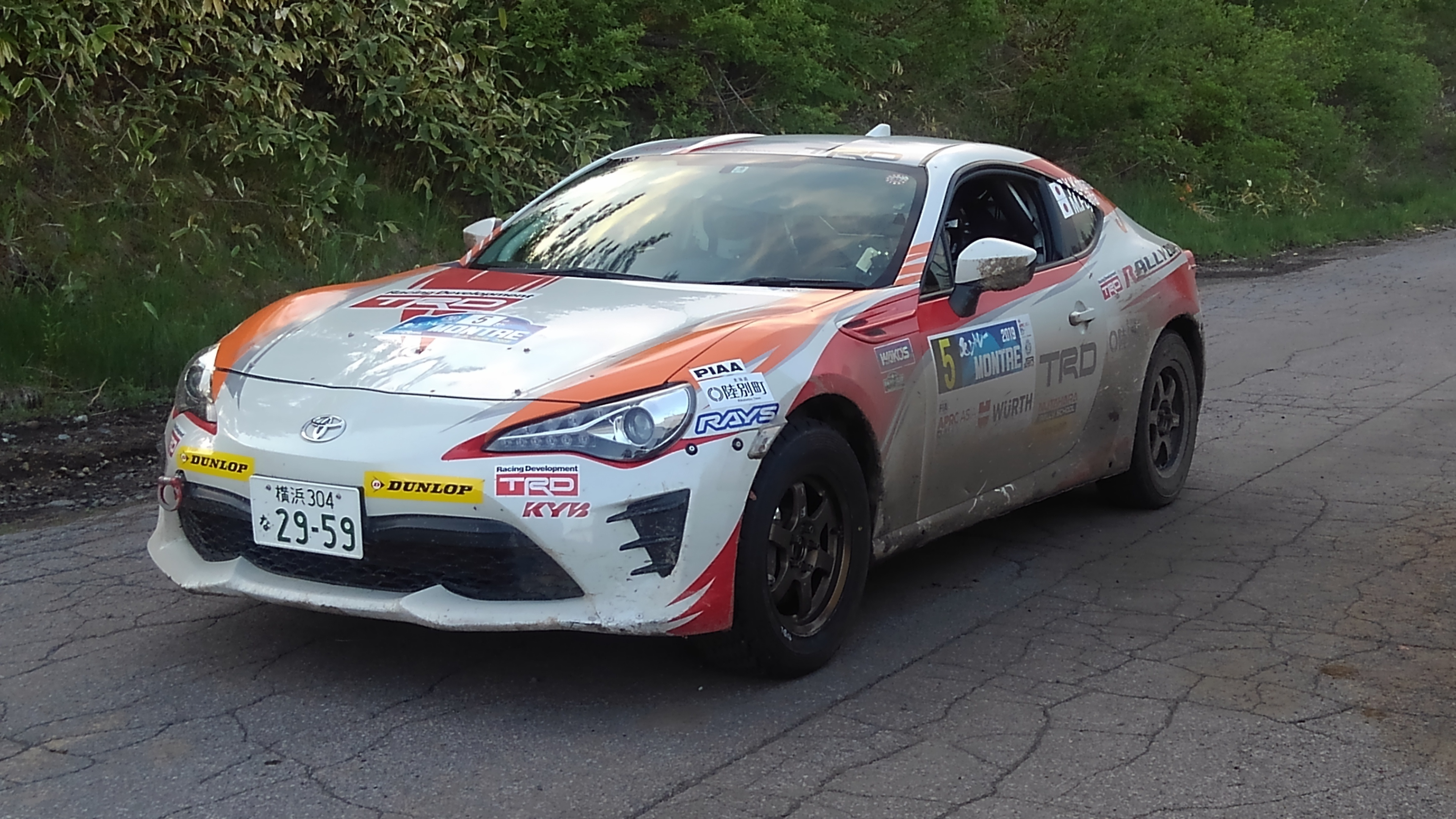 2019年ラリーモントレーにて、APRC/JSRに参戦するTRDのトヨタ・86